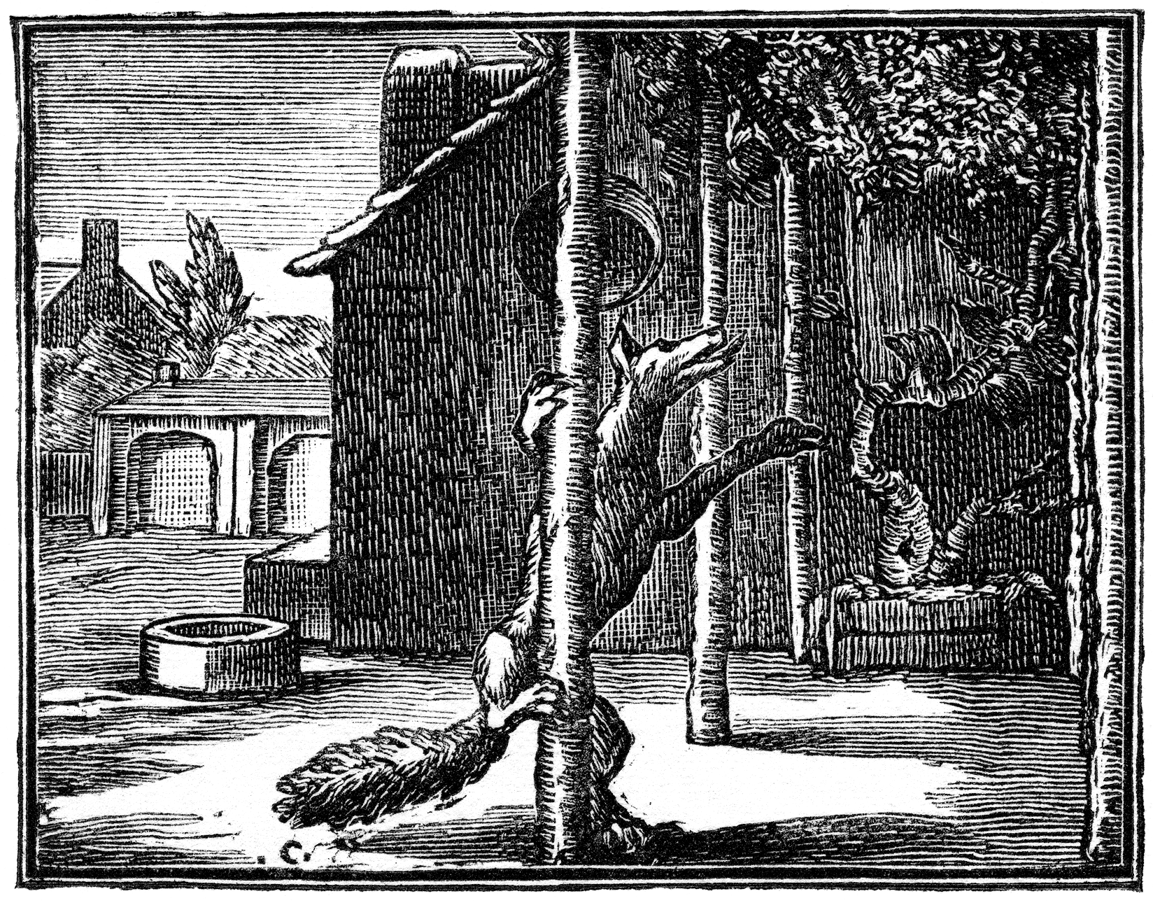 Illustrations pour les « Fables choisies mises en vers par M. de la Fontaine », Claude Barbin et Denys Thierry, Paris, 1668 (premier recueil) 1678-79 (deuxième recueil) 1694 (troisième recueil). Numérotation Charpentier (1705).